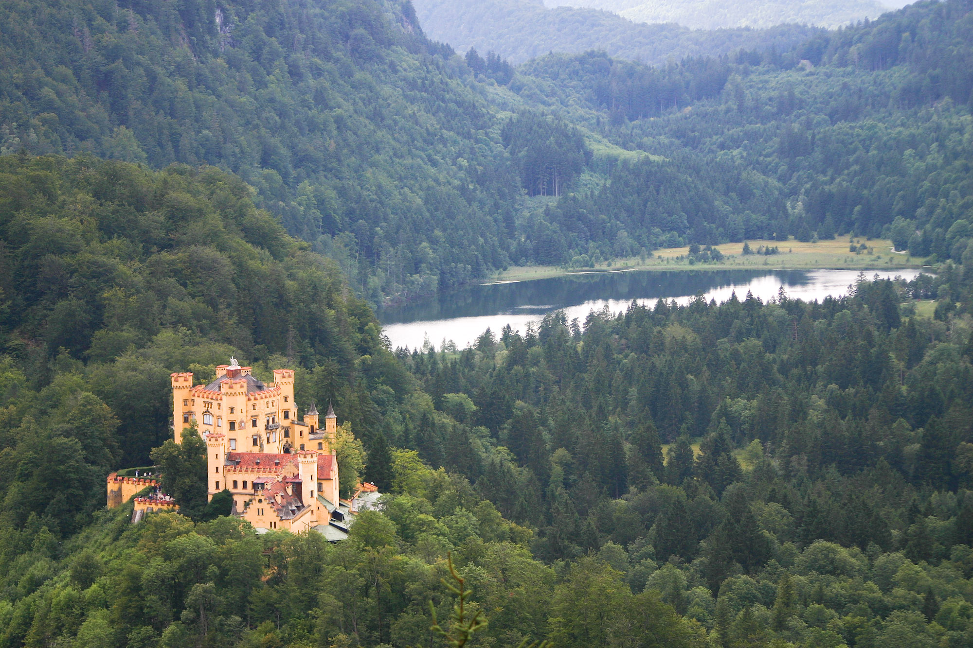 Hohenschwangau